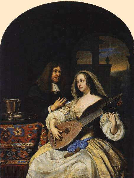 Porträt des François de la Boë (Sylvius) und seiner FrauPortrait of Francois de le Boë Sylvius and his Wifelabel QS:Lde,"Porträt des François de la Boë (Sylvius) und seiner Frau"label QS:Len,"Portrait of Francois de le Boë Sylvius and his Wife"